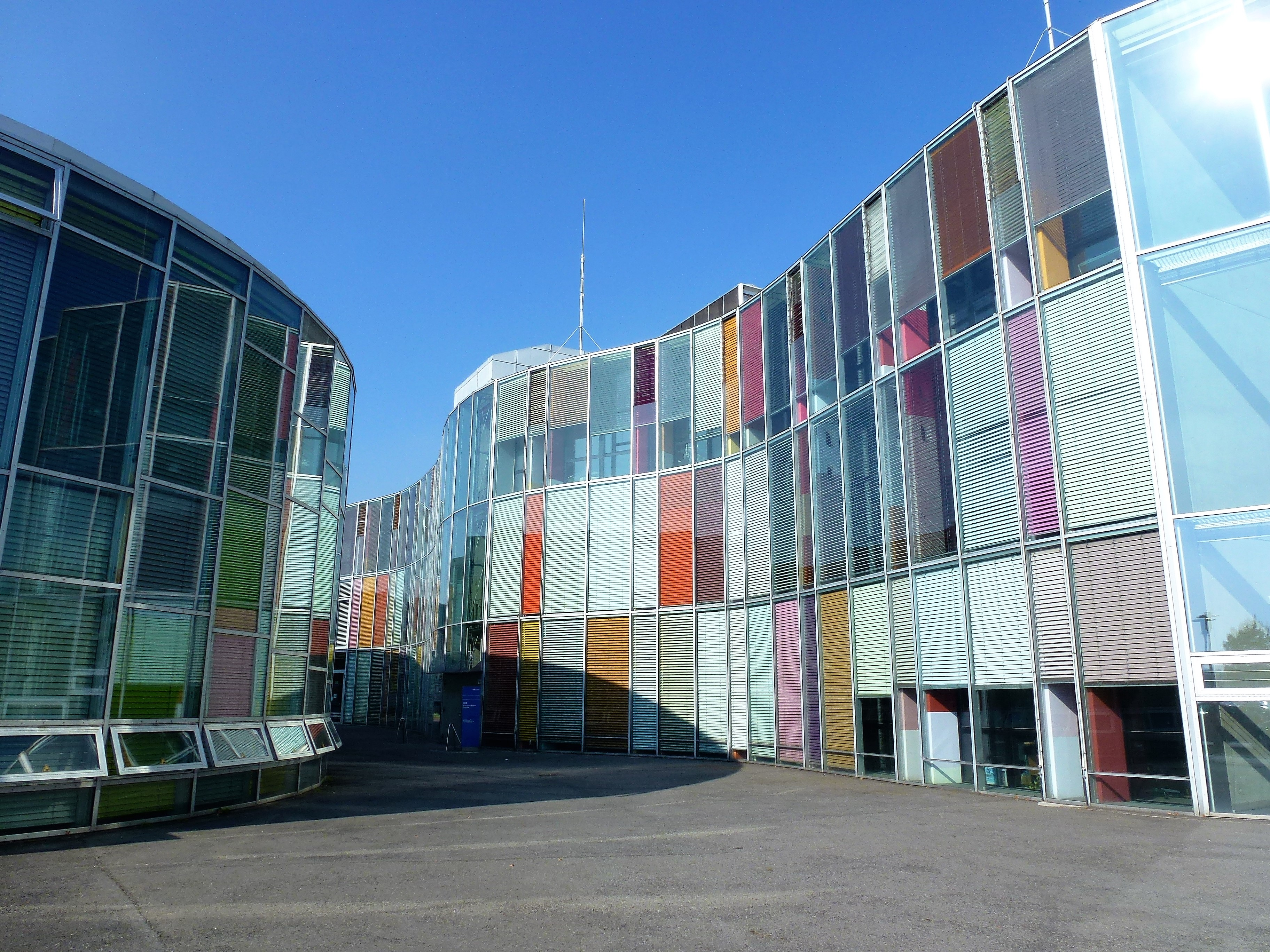 Adlershof Carl-Scheele-Straße Zentrum für Photonik und Optik (ZPO)